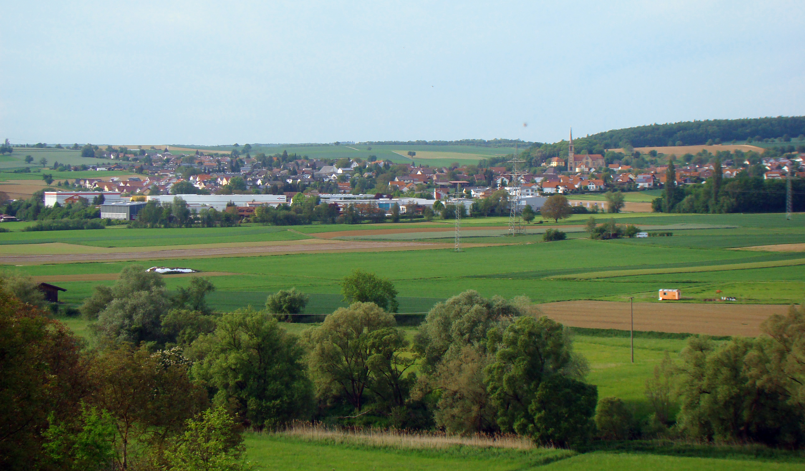 Blick auf Stein am Kocher, von Kochertürn aus gesehen